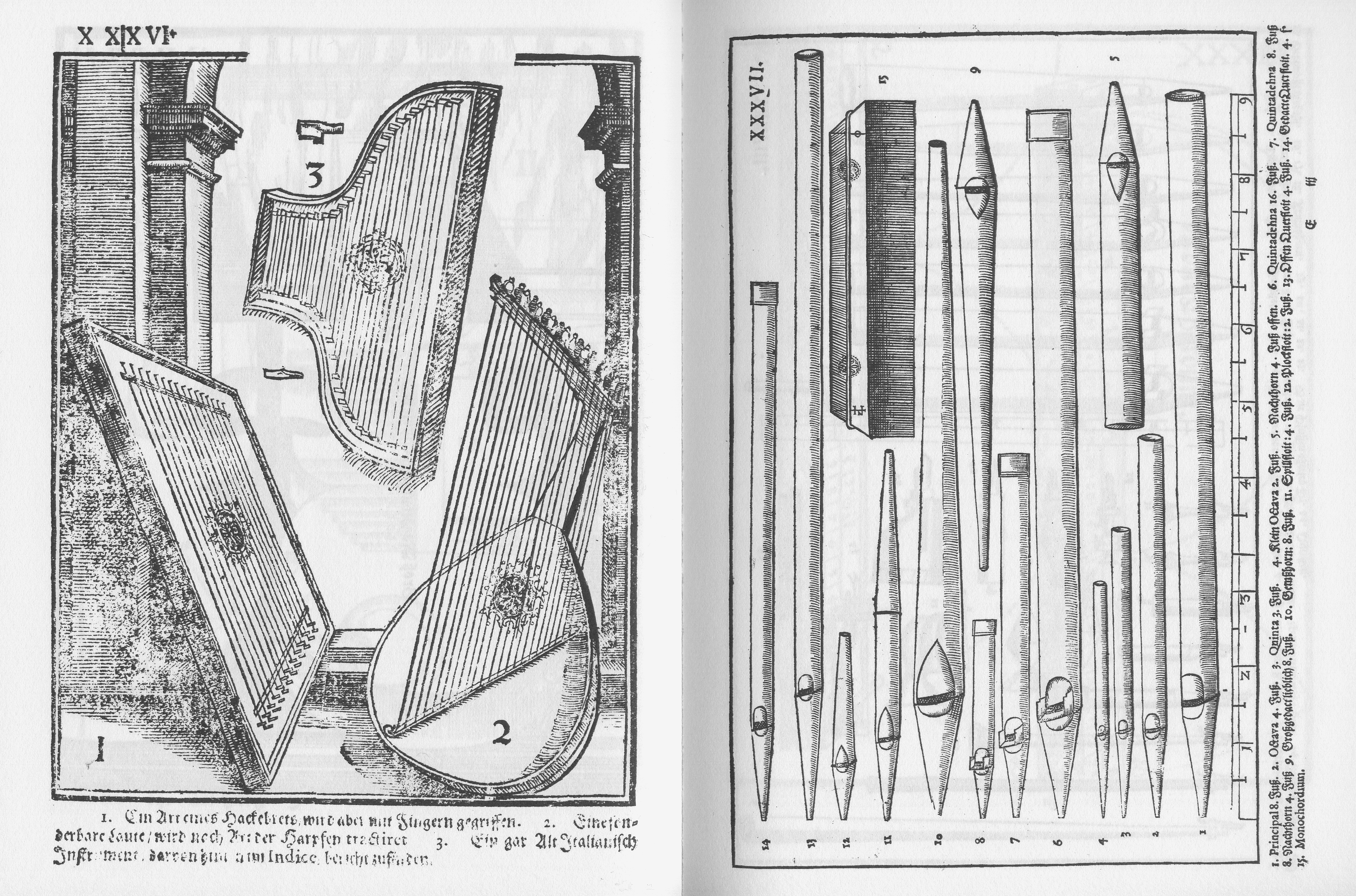 Syntagma Musicum Theatrum Instrumentorum seu Sciagraphia Wolfenbüttel 1620